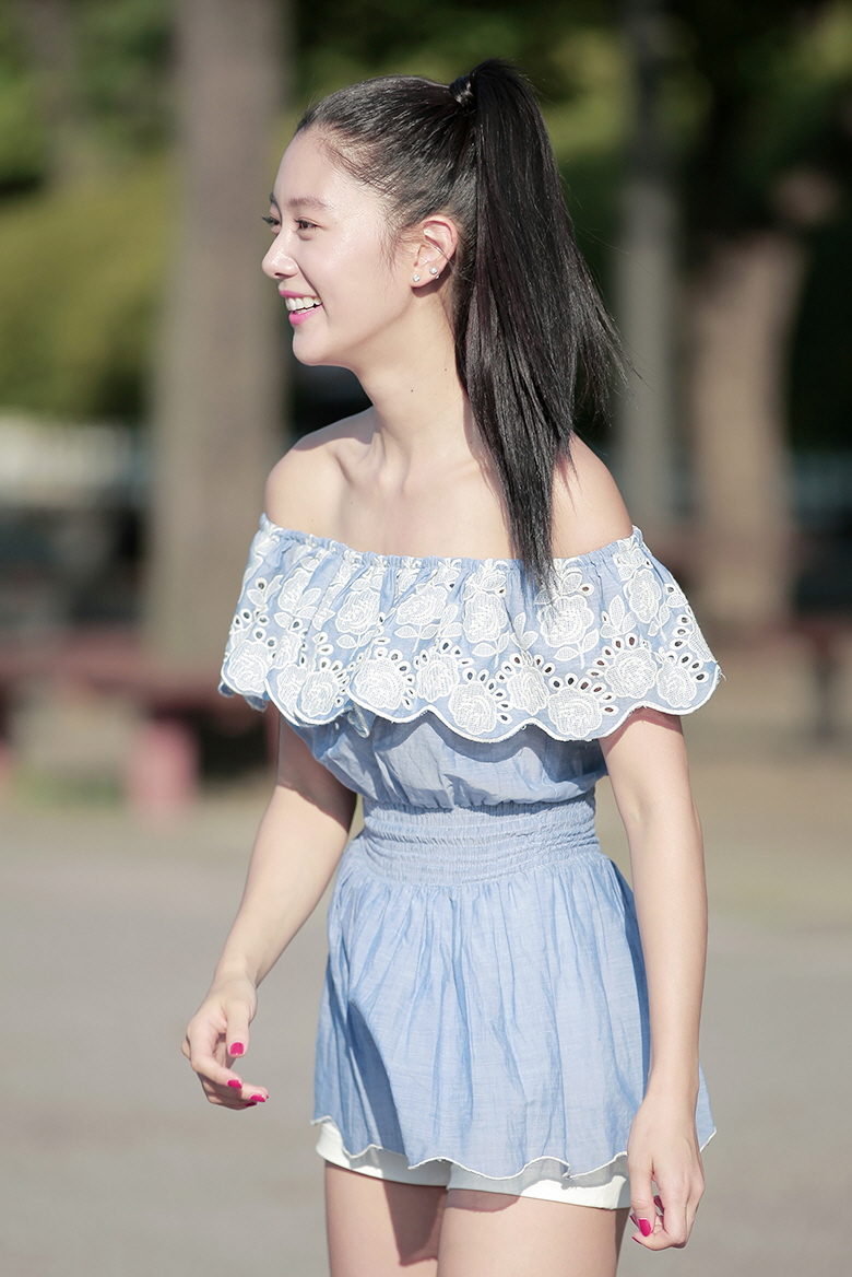 클라라 2013 NBA 3X 여의도